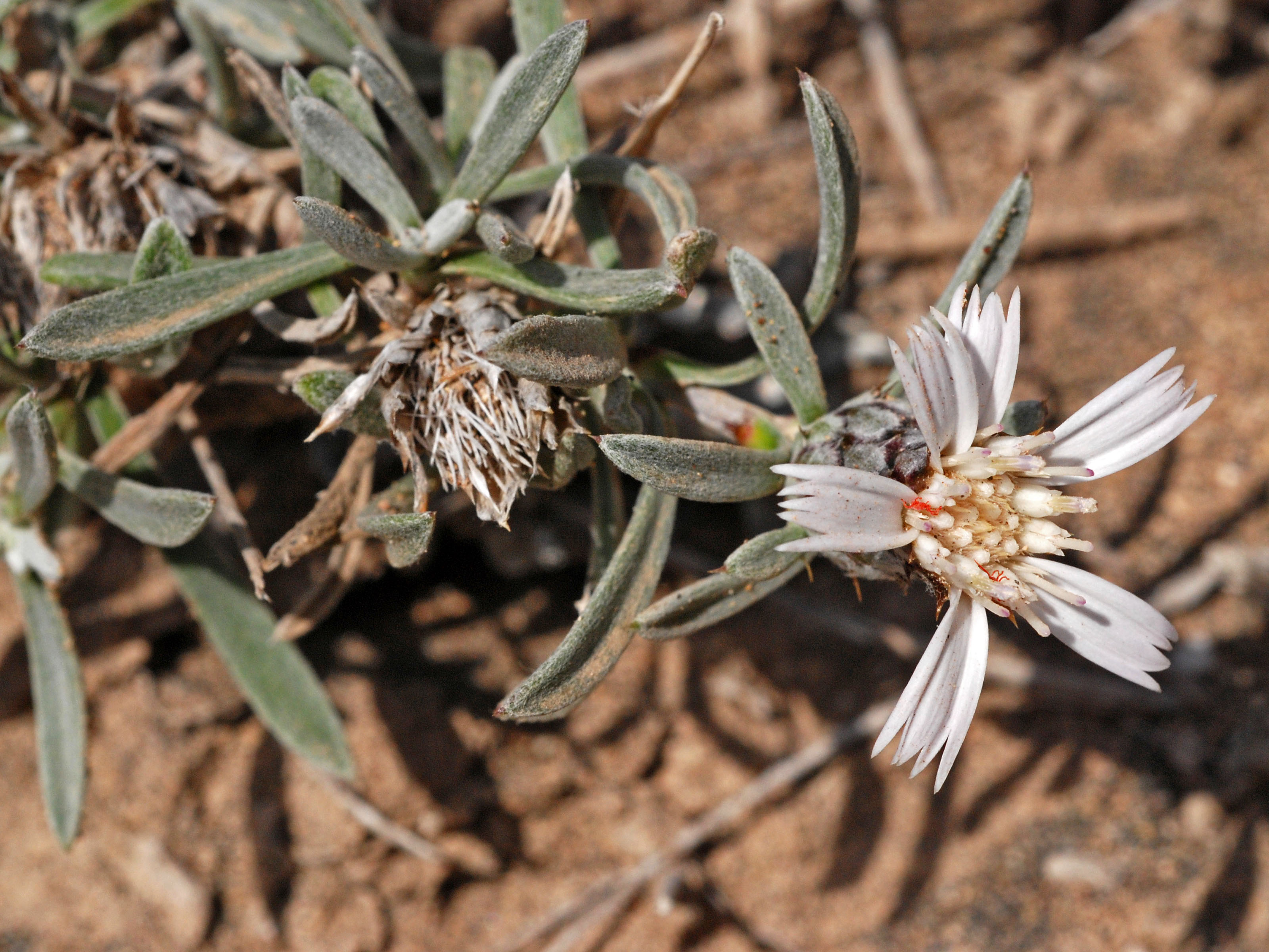 Atractylis preauxiana - Capítulo - Punta Arinaga, Isla de Gran Canaria (España).